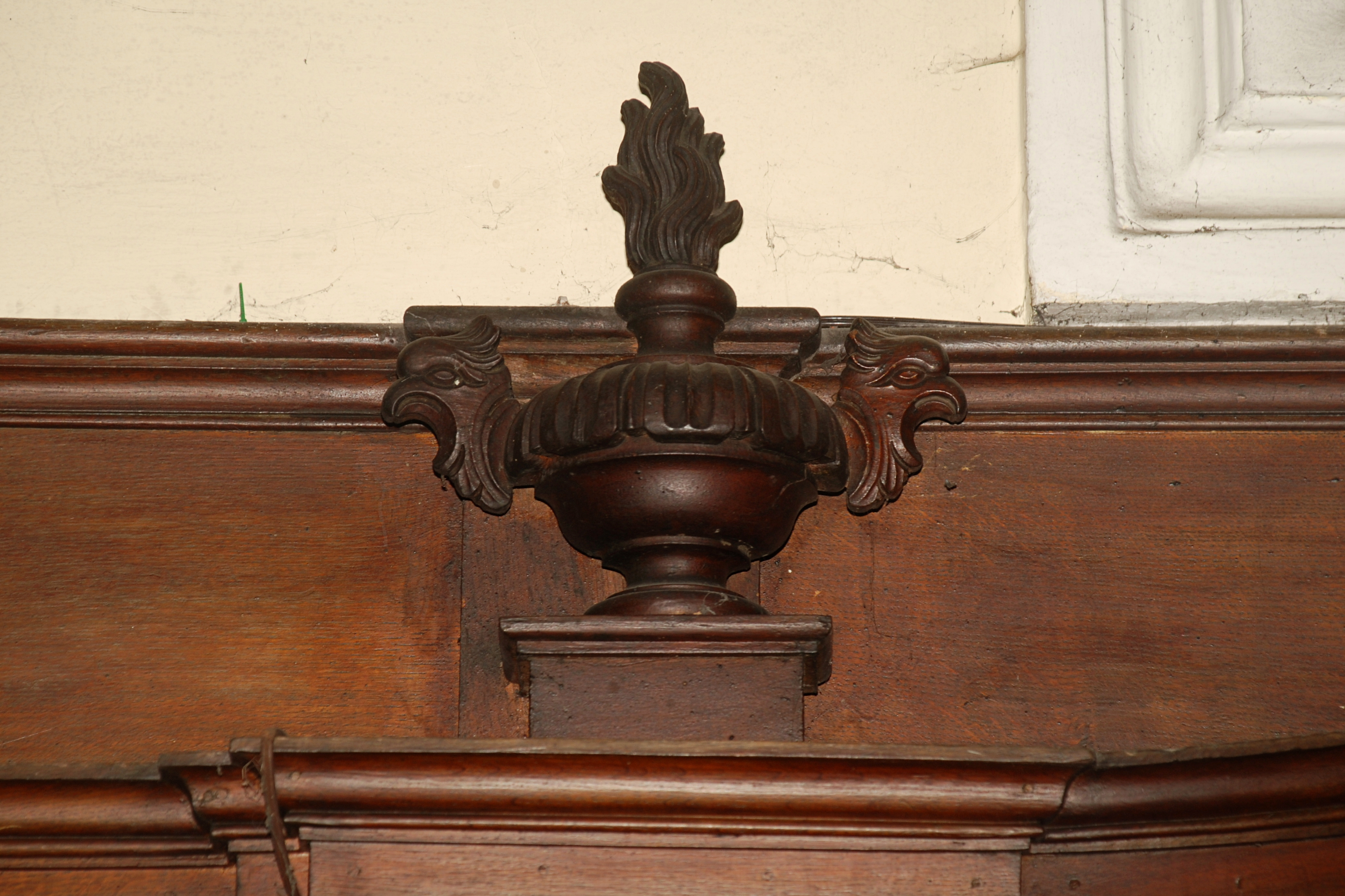 Belgique - Brabant wallon - Église Saint-Martin de Ways